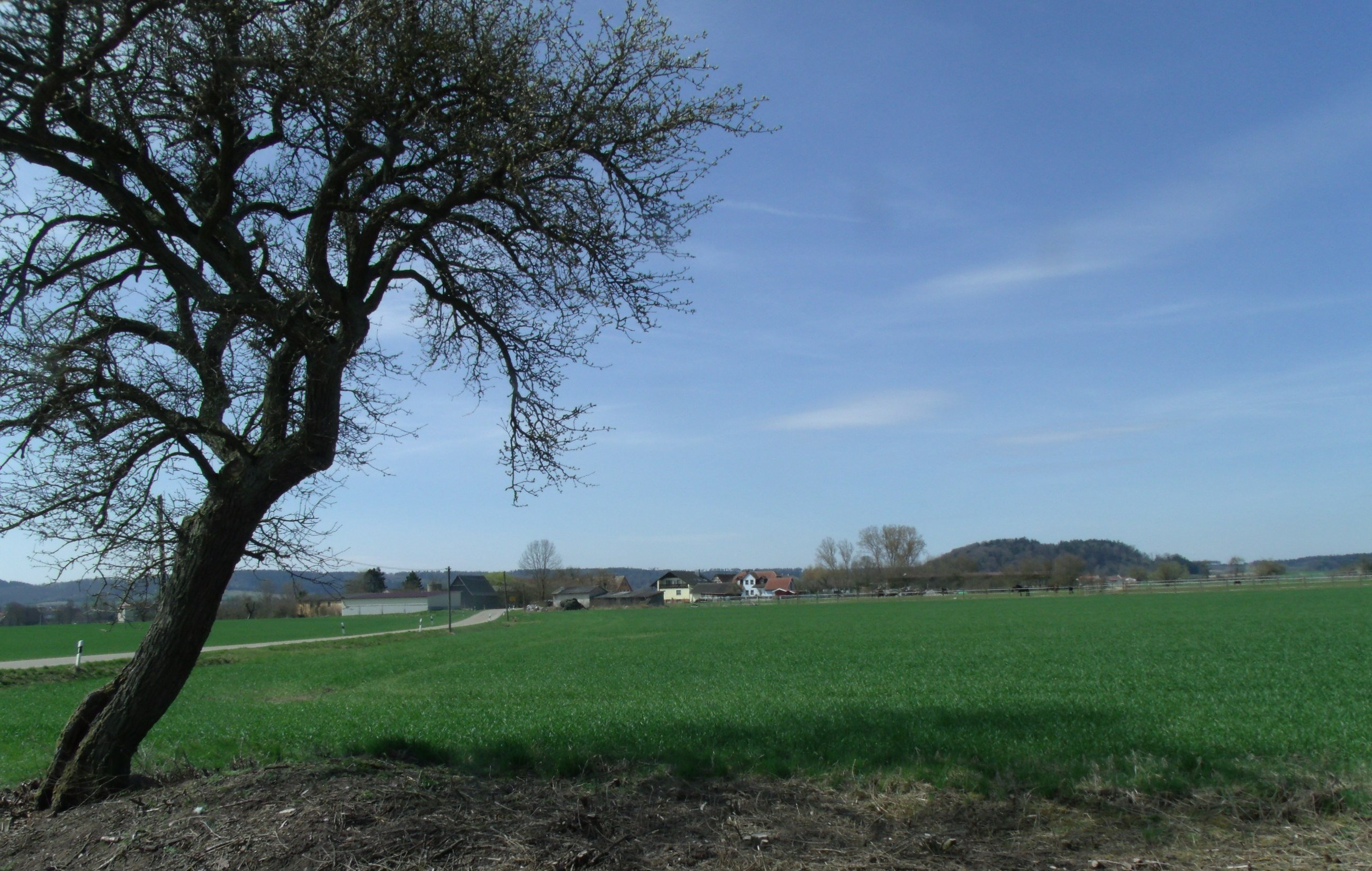 Steinberg, Ortsteil von Leutershausen im Landkreis Ansbach